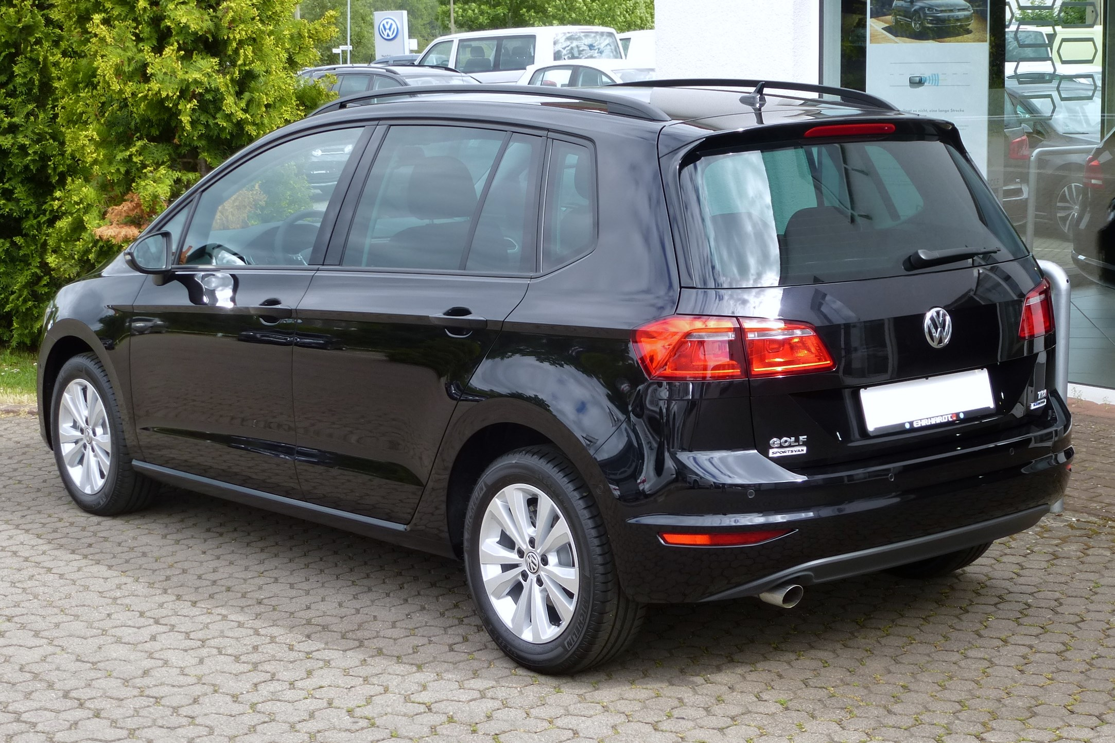 VW Golf Sportsvan